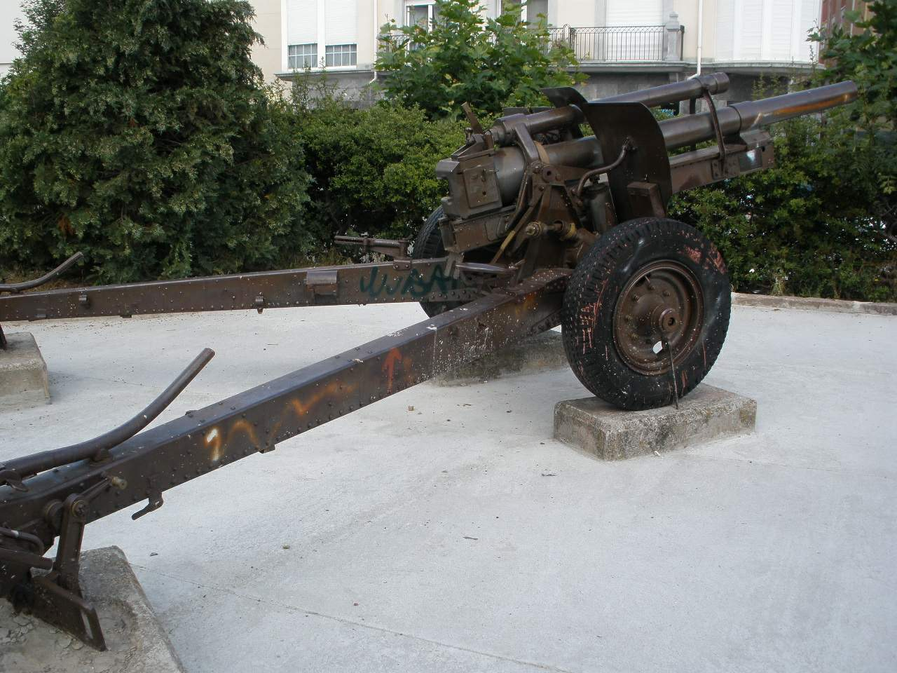 Reinosa (Cantabria)